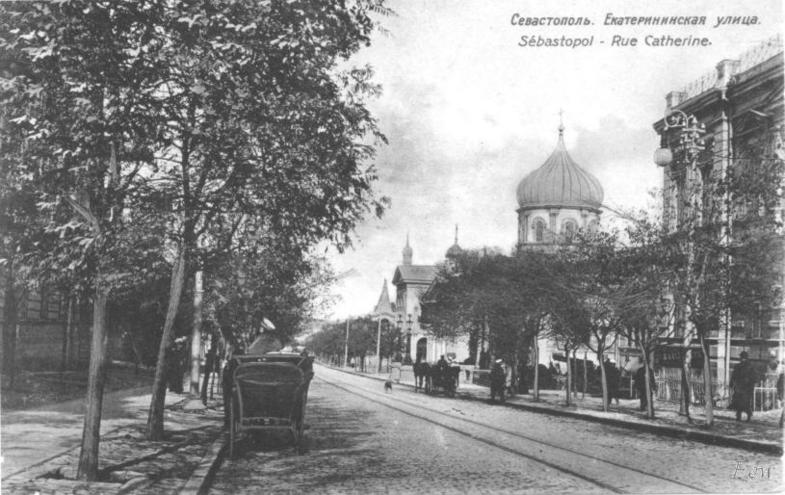 Улица Екатерининская в начале 20 века, Севастополь